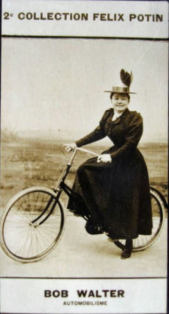 Bob-Walte